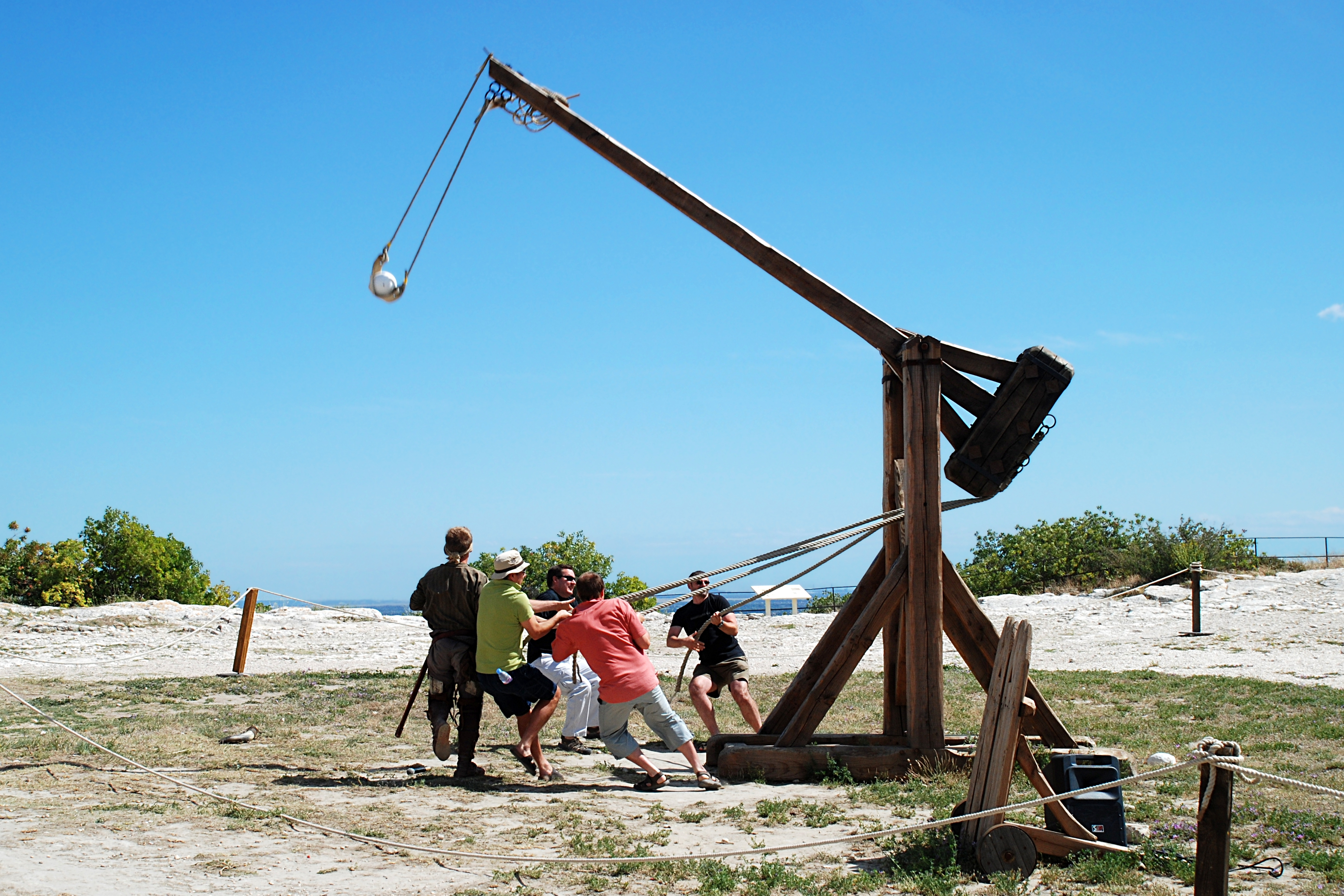 France - Provence - Château des Baux - Machine de siège - Bricole